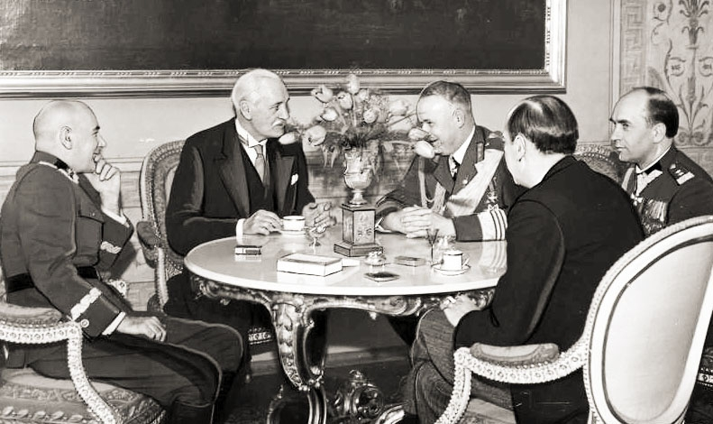 Uroczyste śniadanie wydane przez Prezydenta RP Ignacego Mościckiego (2. z lewej) na Zamku Królewskim na cześć generała Johana Laidonera (3. z lewej). Widoczni także marszałek Edward Śmigły-Rydz (1. z lewej), gen. Tadeusz Kasprzycki (2. z prawej) oraz minister spraw zagranicznych Józef Beck (1. z prawej).